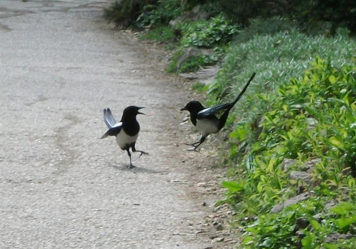 tájképi kert, Margitsziget, Budapest